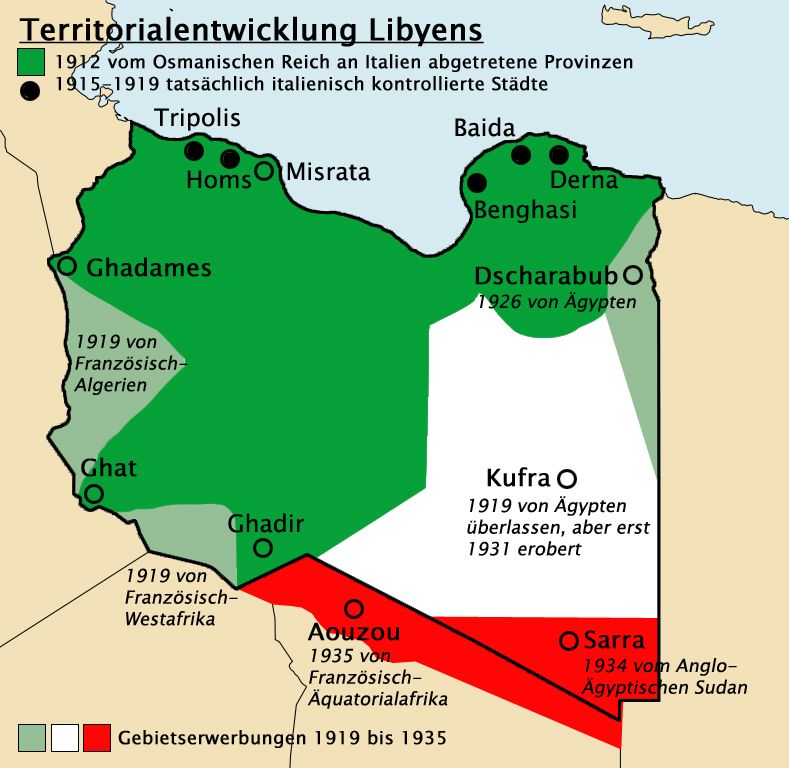 Territoriale Ausdehnung Libyens während der italienischen Kolonialherrschaft (1912-1943) nach Atlante Storico (Atlas der Weltgeschichte), David Nicolle: Die Osmanen, Seite 180, Haack Atlas zur Geschichte, Band 1, Seiten 116f, Westermann Großer Atlas zur Weltgeschichte, Seiten 146 und 153 sowie Putzger Historischer Weltatlas, Seiten 111 und 144